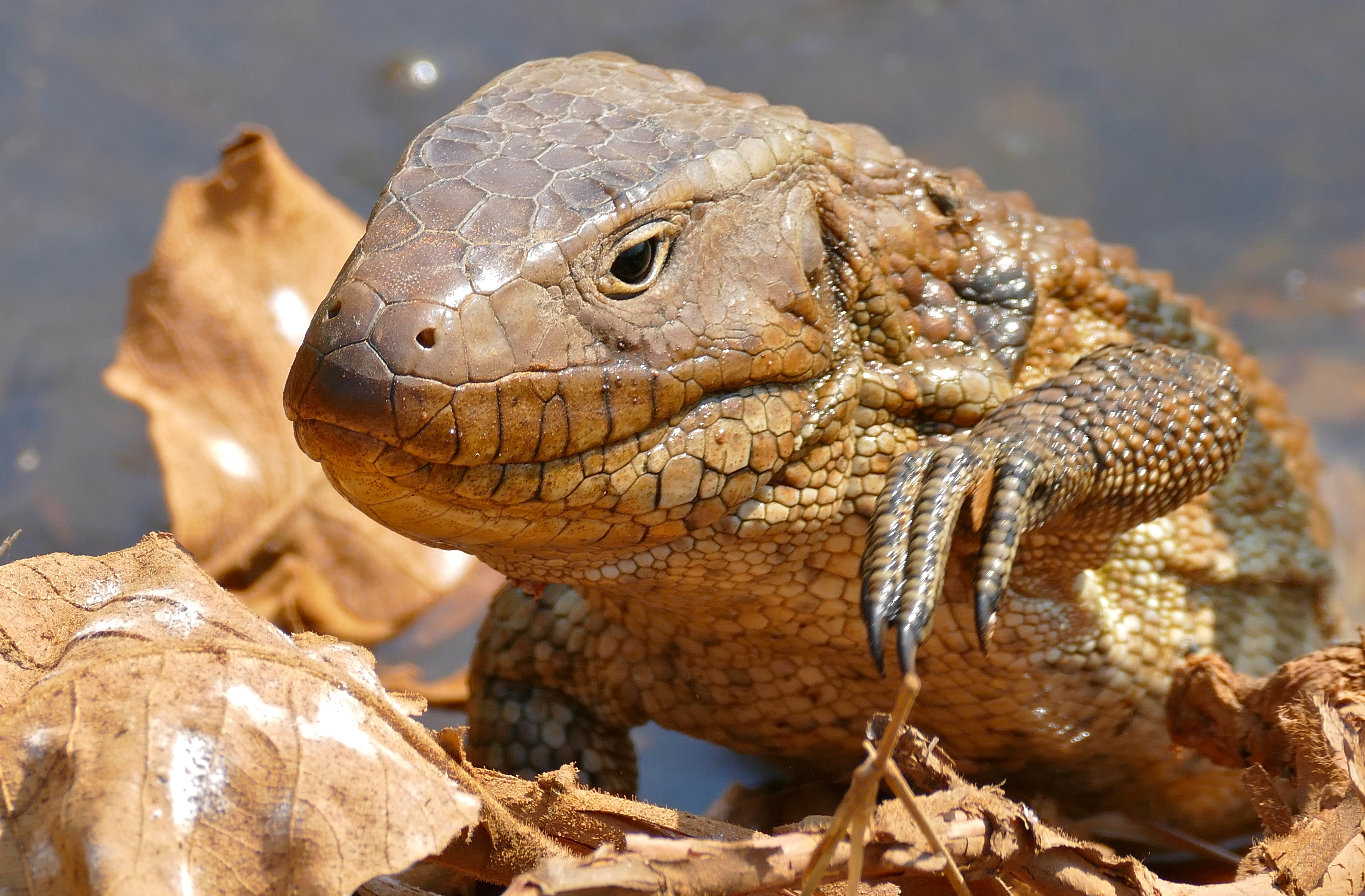 Transpantaneira, Poconé, Mato Grosso, BRAZIL